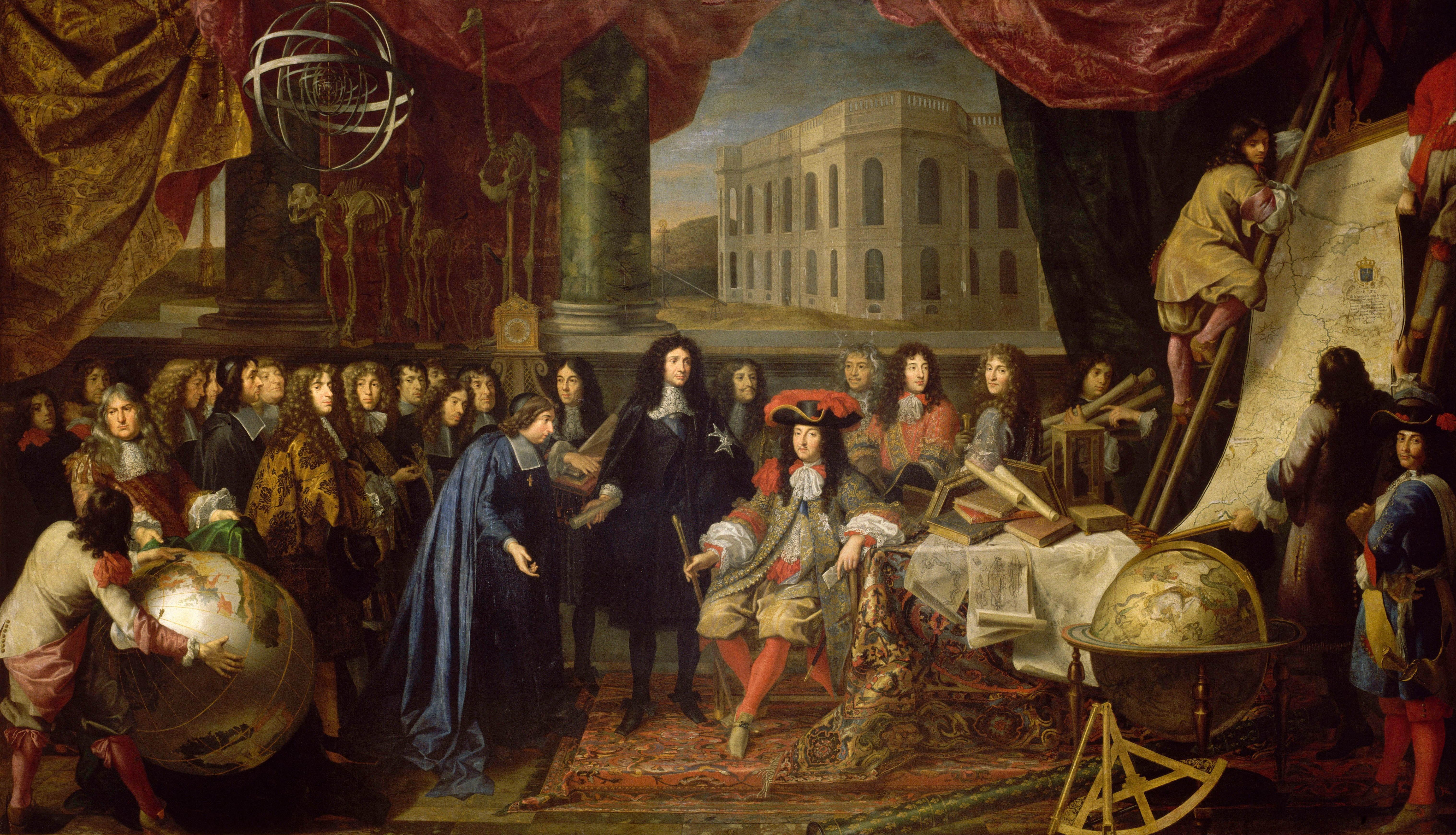 Notes d'après RMN ; Accès en ligne